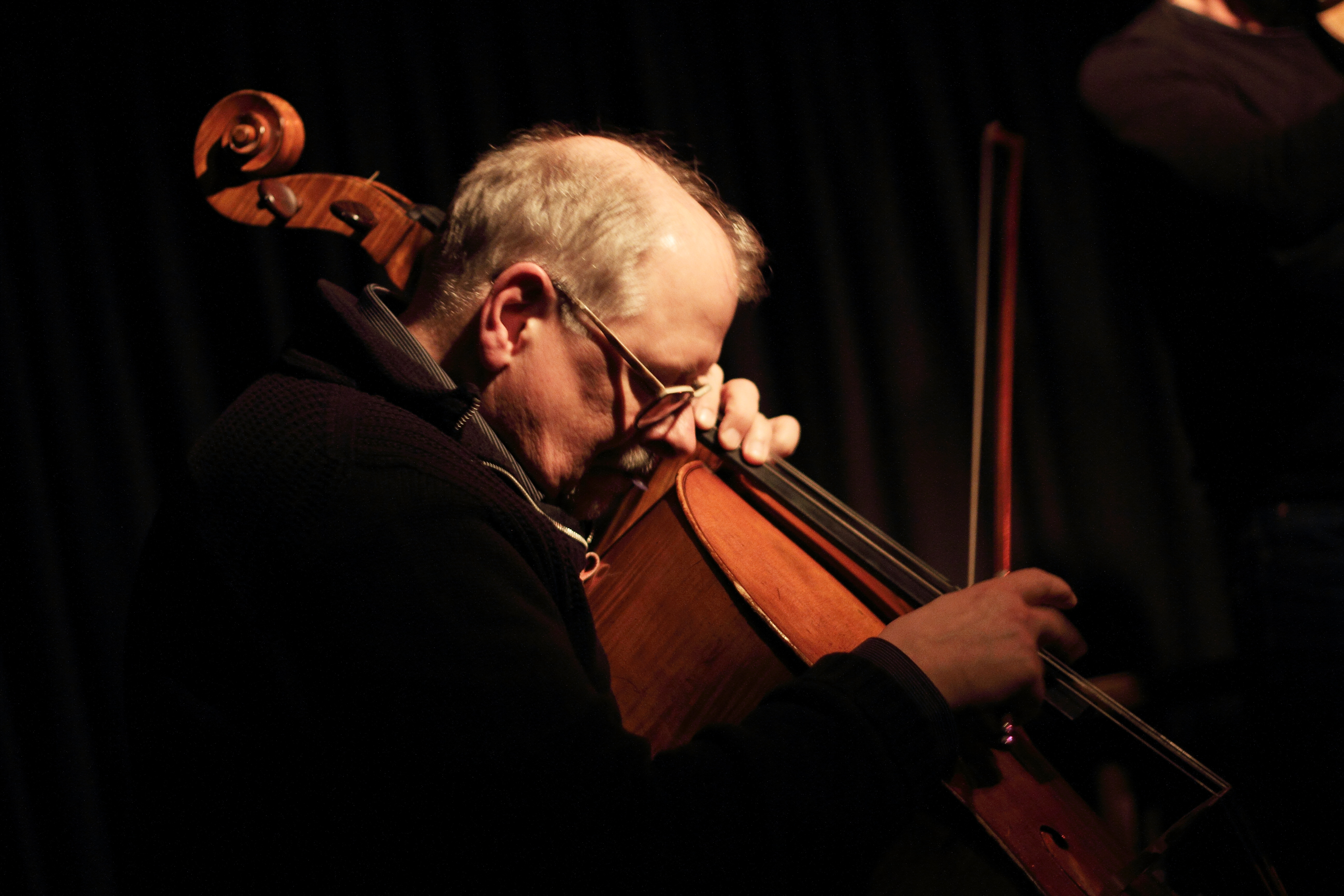 Der Schweizer Cellist und Komponist im Club W71, Weikersheim.